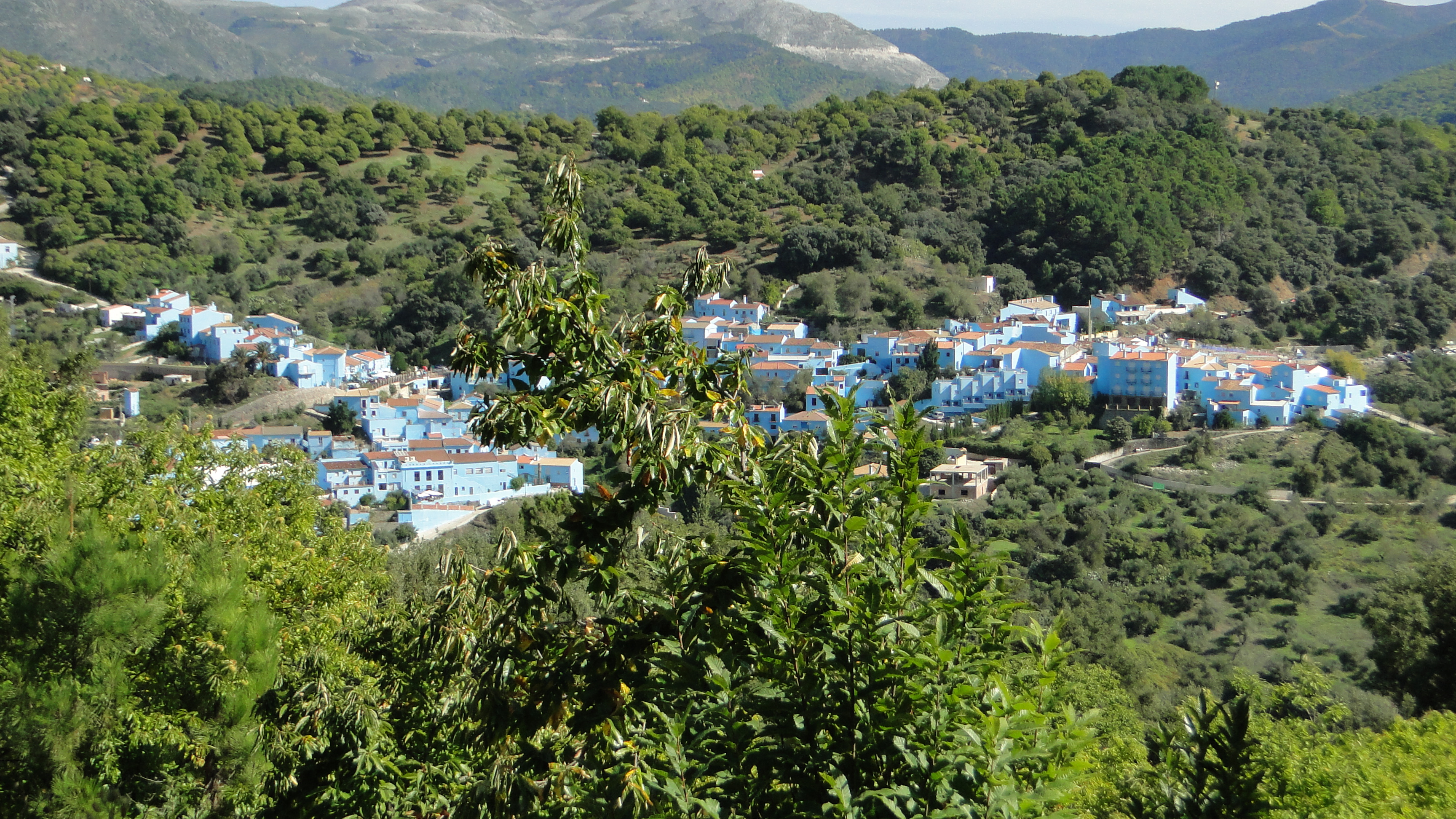 Júzcar (Málaga). Valle del Genal.